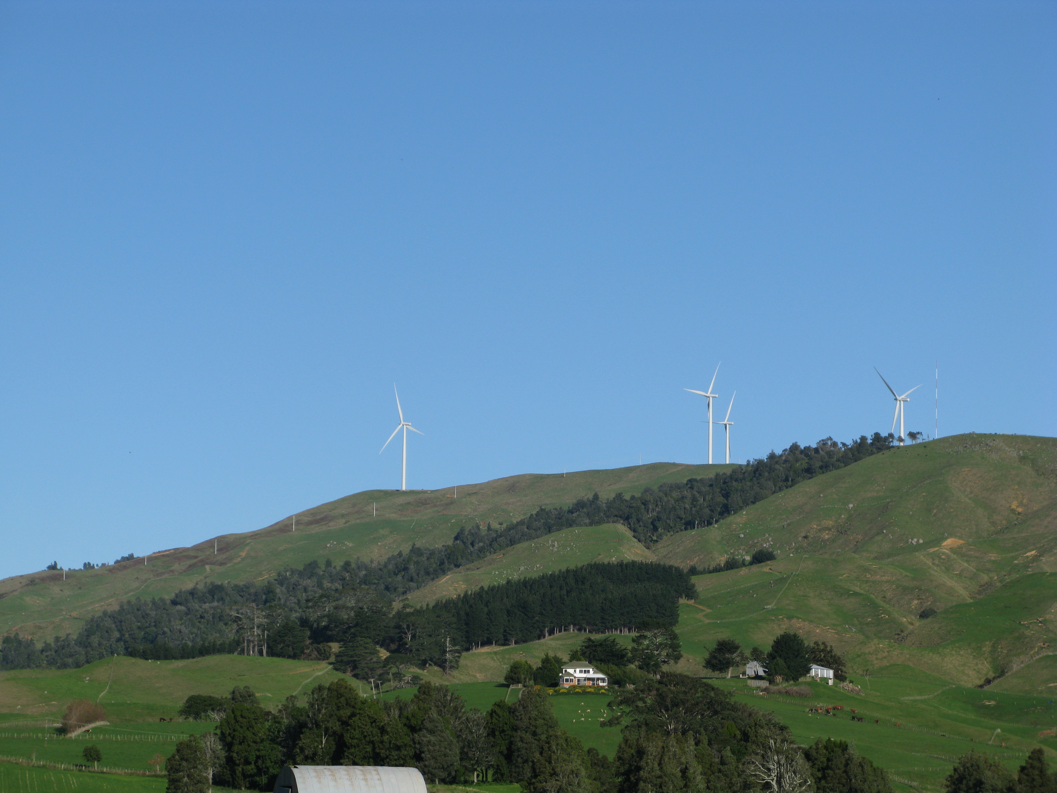 Te Uku wind farm, en Nouvelle Zélande